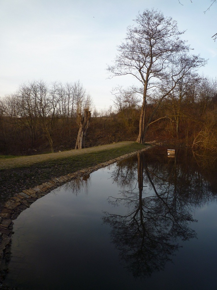 Hráz Kostoprtského rybníka. Přírodní památka Čimické údolí, Praha.